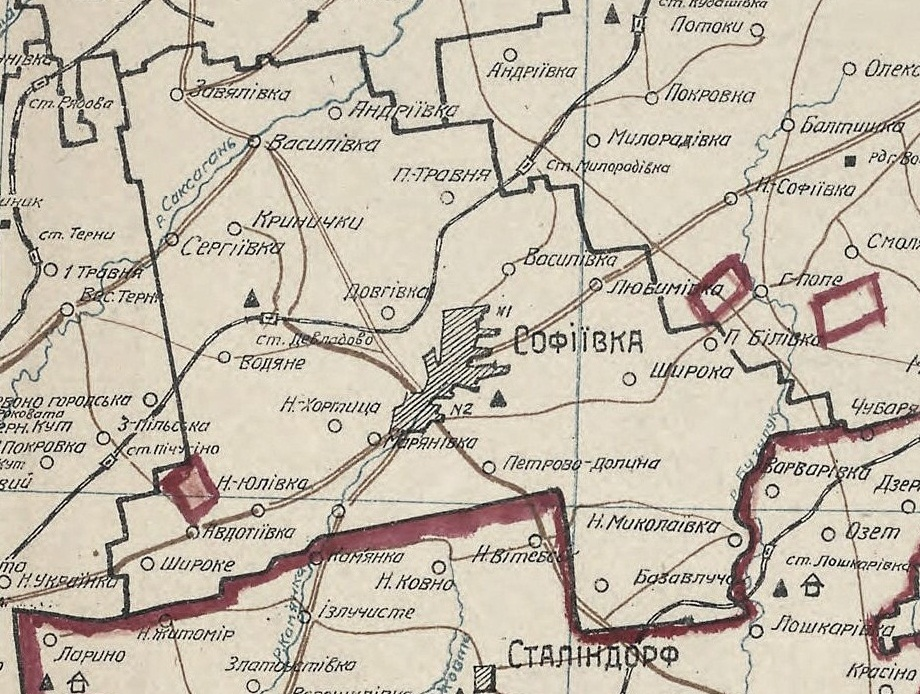 Софіївський район на карті Дніпропетровської області. 1935.